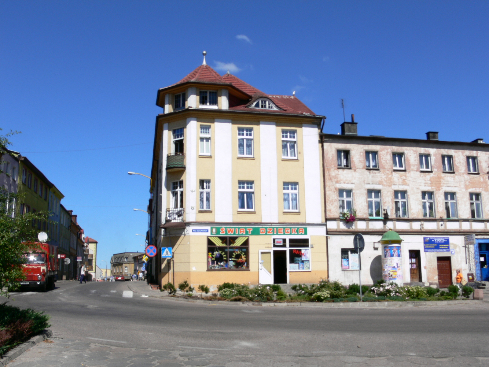 Karlino - widok sprzed ratusza na ul.Koszalińską